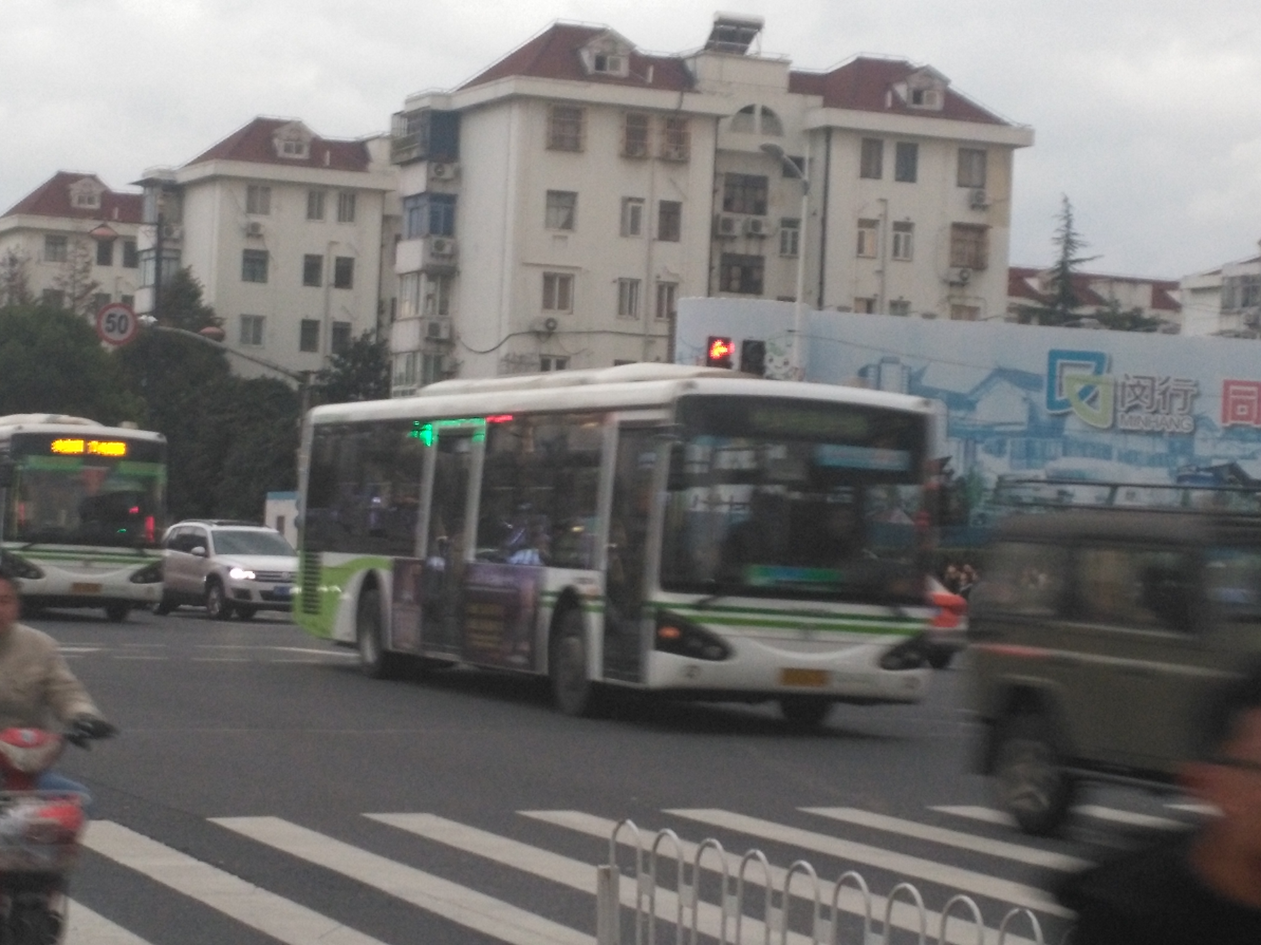 上海公交虹桥枢纽4路，经过七莘路漕宝路（沪松公路）